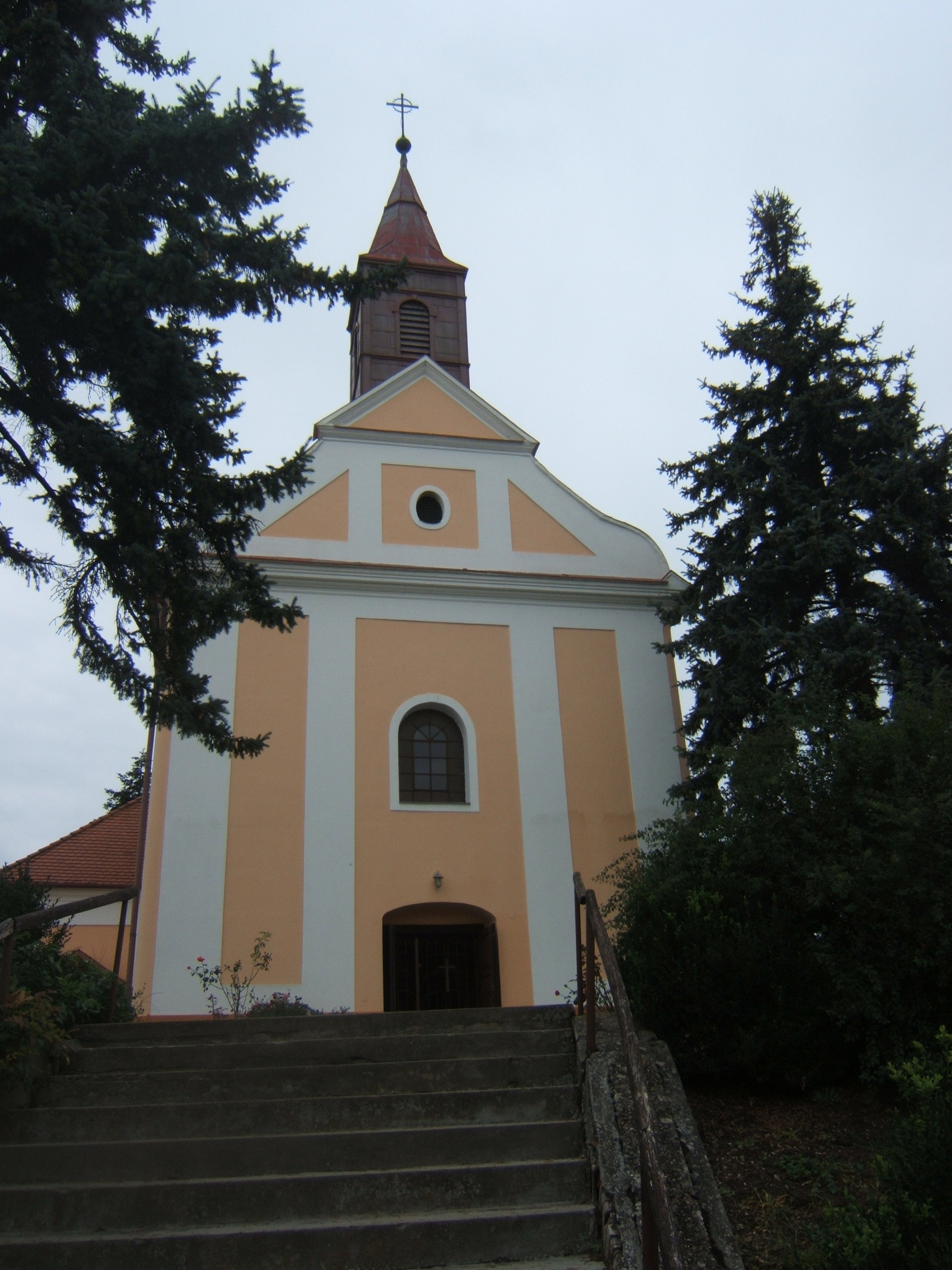 Somogyszobi római katolikus templom